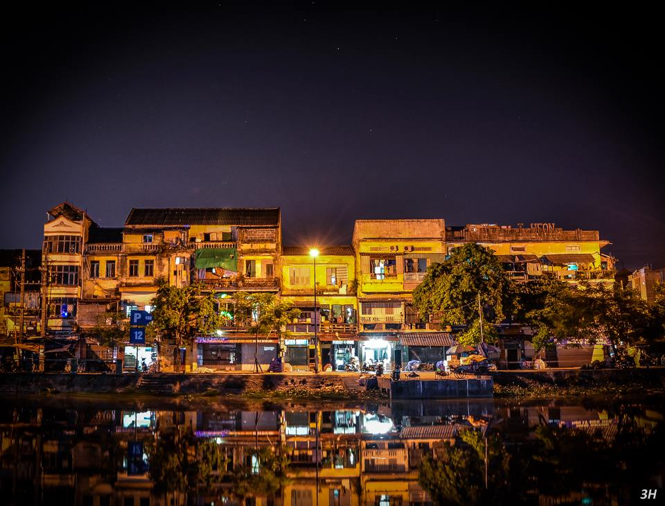 Phố Cổ bên Sông Tam Bạc Hải Phòng - Tác giả Trịnh Tiến Hưng đăng ảnh .